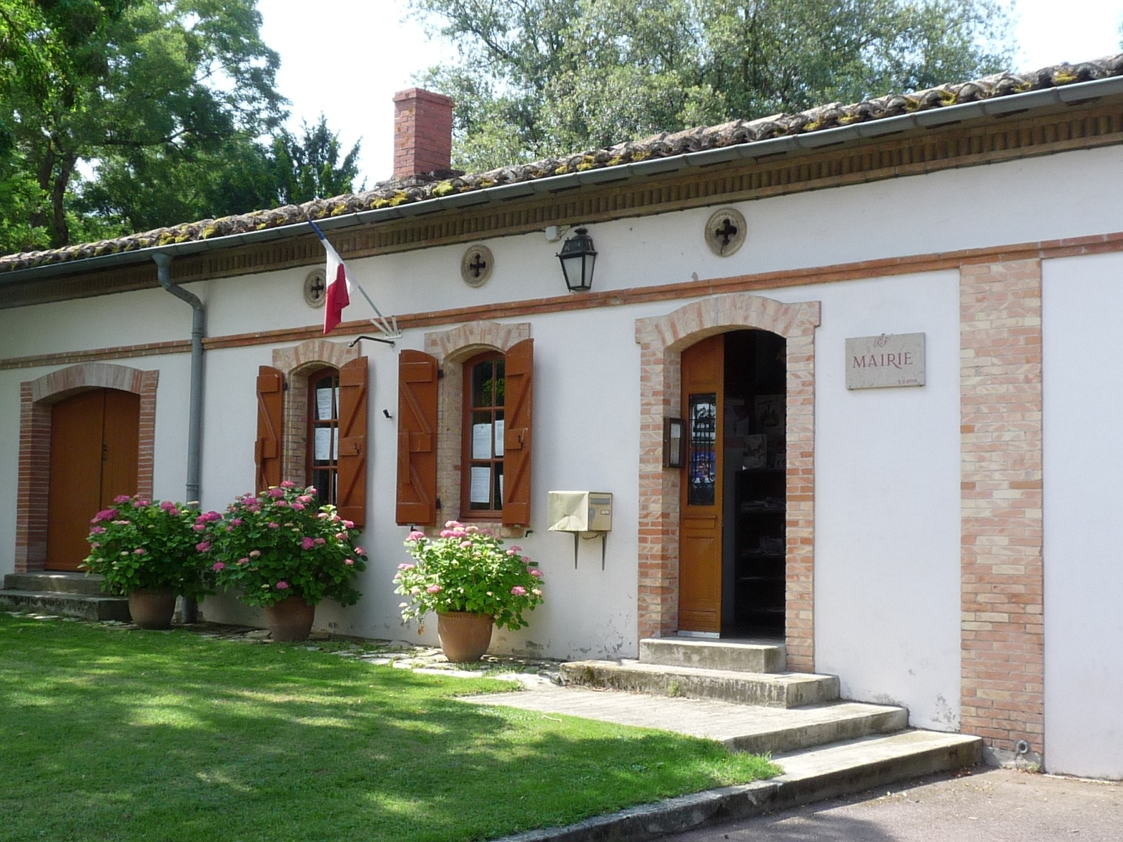 Mairie de Varennes, Haute-Garonne, France